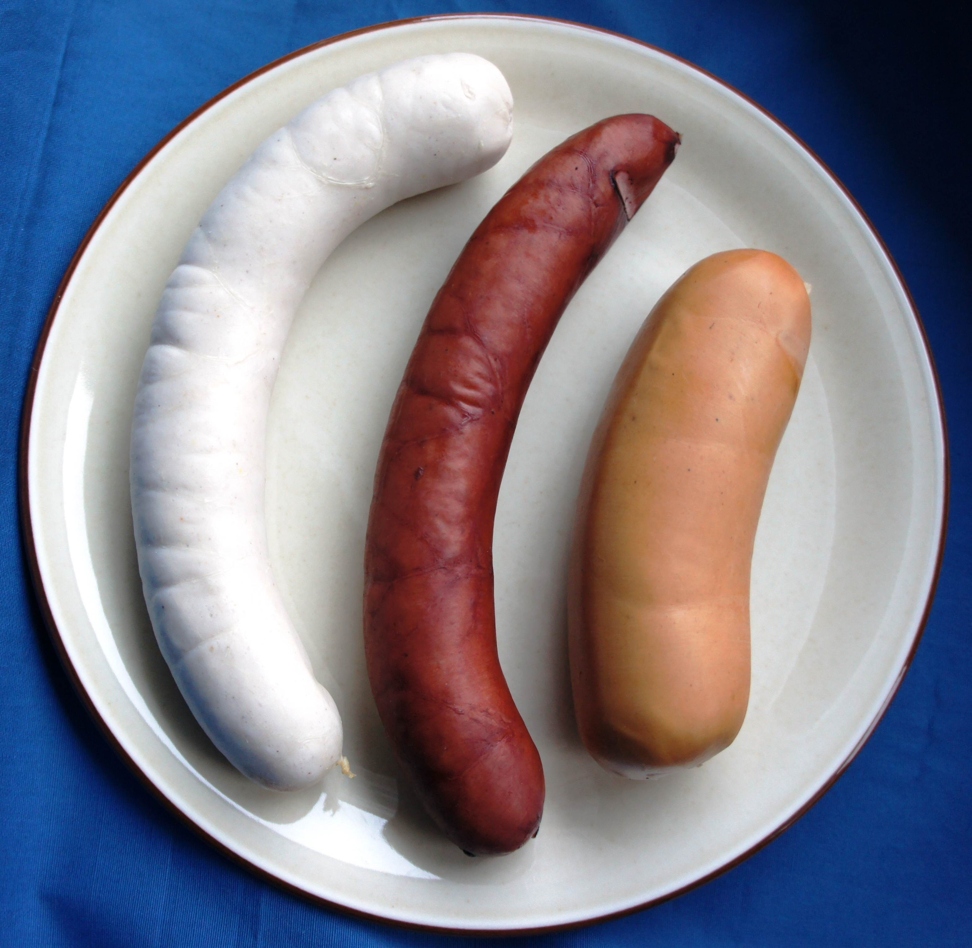 Eine St. Galler Bratwurst, St. Galler Schüblig und Cervelat - alle gekocht, aber noch nicht gebraten, resp. heiss gemacht.